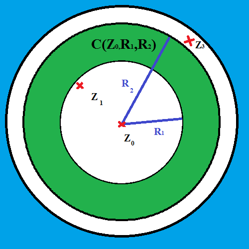 Illustration pour l'article fonction holomorphe, développement de Laurent.